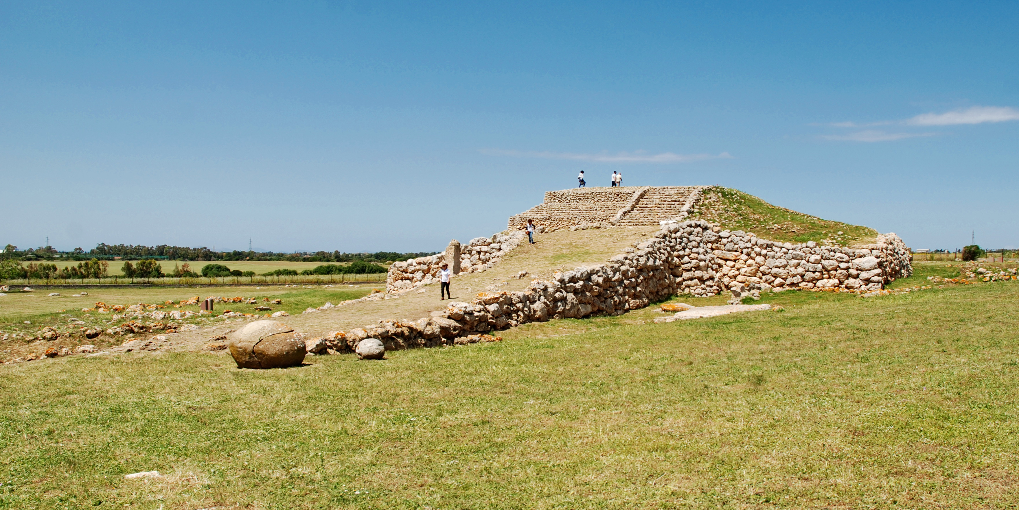 Monte D'Accoddi - MIBAC This is a photo of a monument which is part of cultural heritage of Italy.